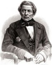 Porträt von Joseph Hamel